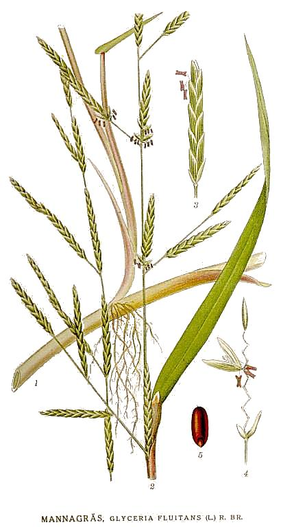 Glyceria fluitans (L.) R. Br. Original Description "Mannagräs", Glyceria fluitans (L.) R. Br.